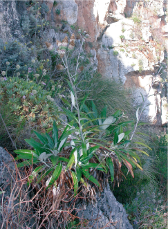 Pianta in ambiente rupestre